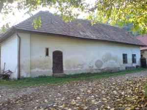 Správcovská budova bývalej huty